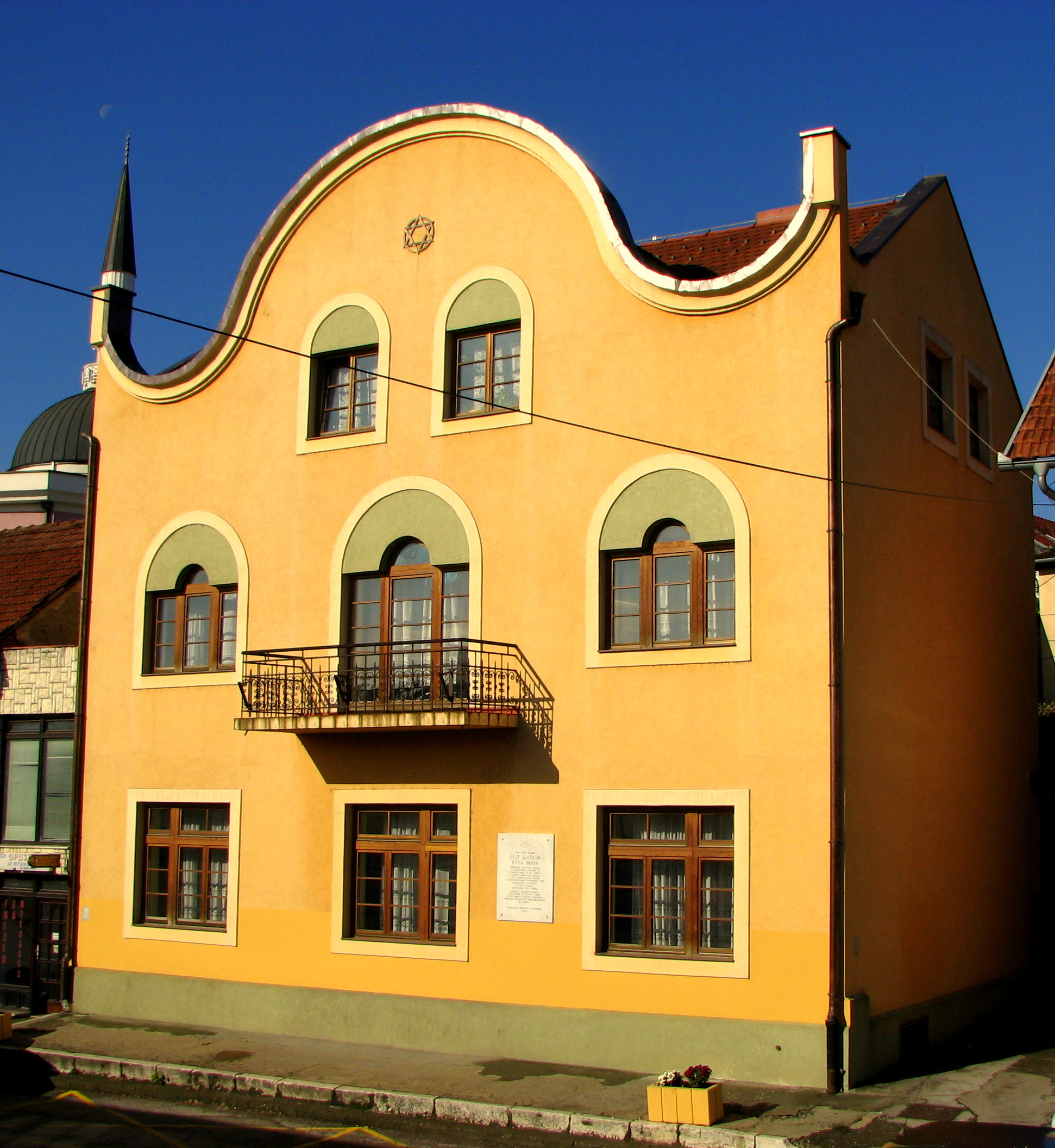 Синагога Бејт Шалом - Кућа мира. Аутор: Бранко Д. Тодоровић